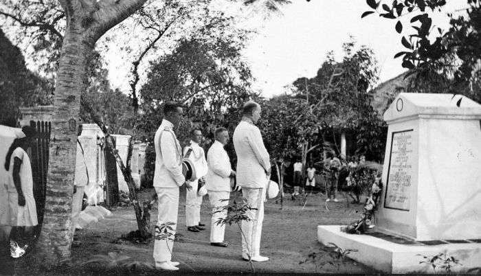 Repronegatief. Kranslegging door Gouverneur-Generaal De Graeff en Gouverneur Van Sandick bij het gedenkteken voor Rumphius op Ambon